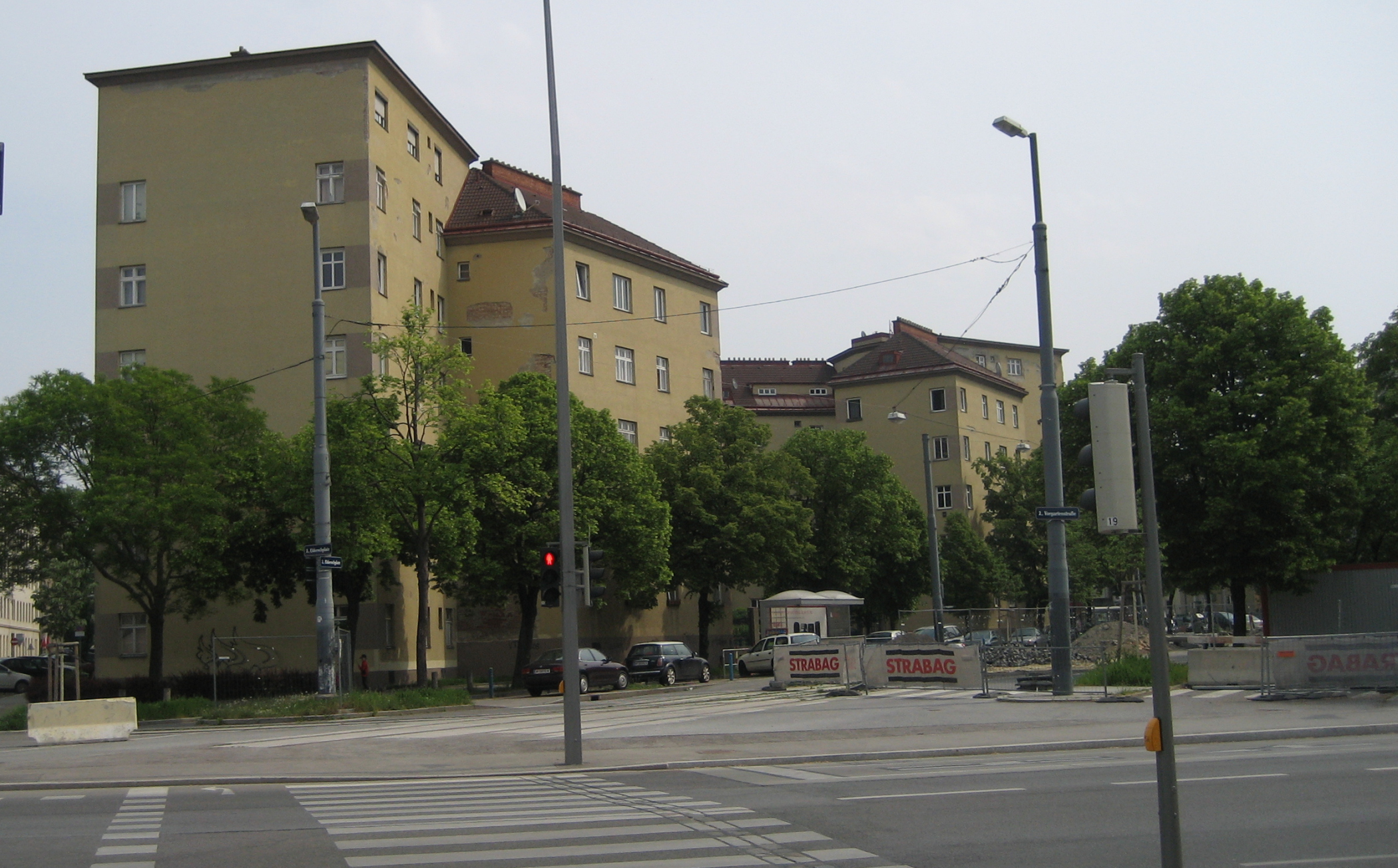 Das Haus Elderschplatz 1-2 "Elderschhof" in der Leopoldstadt, in Wien